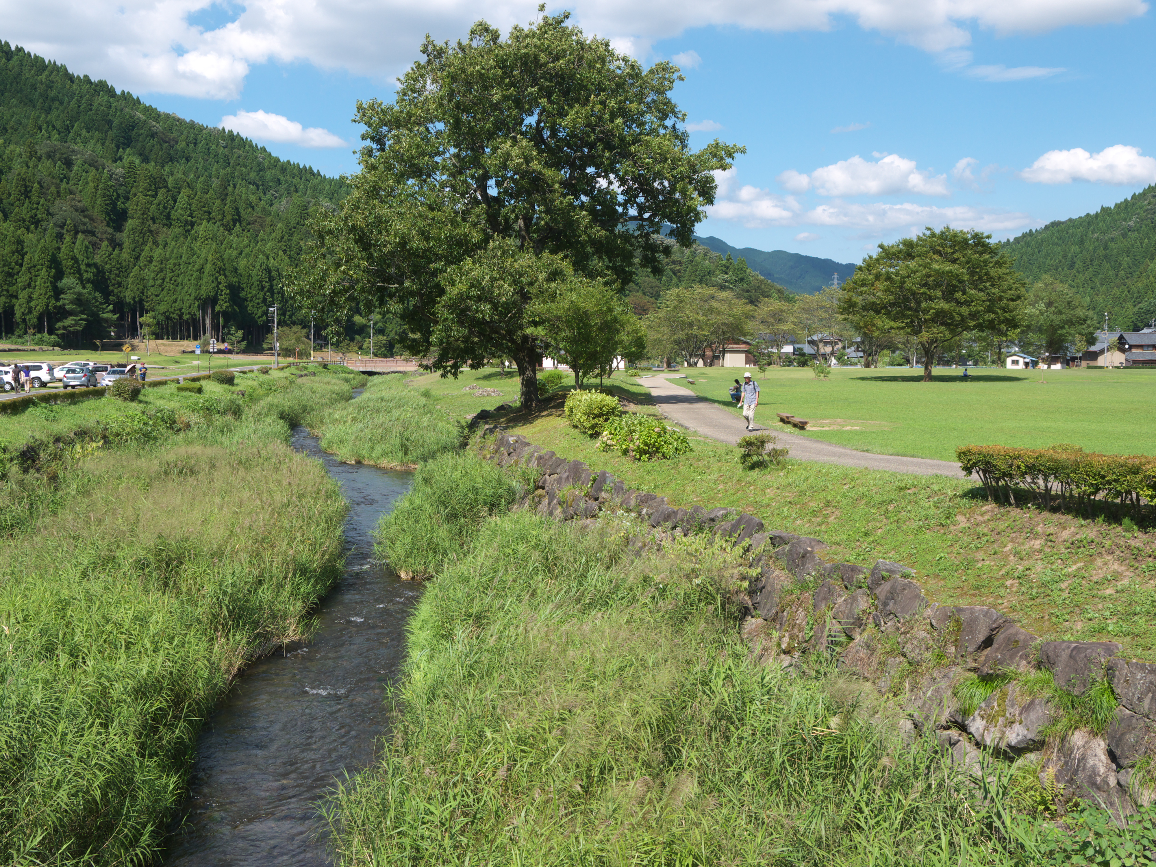 一条谷川晩夏